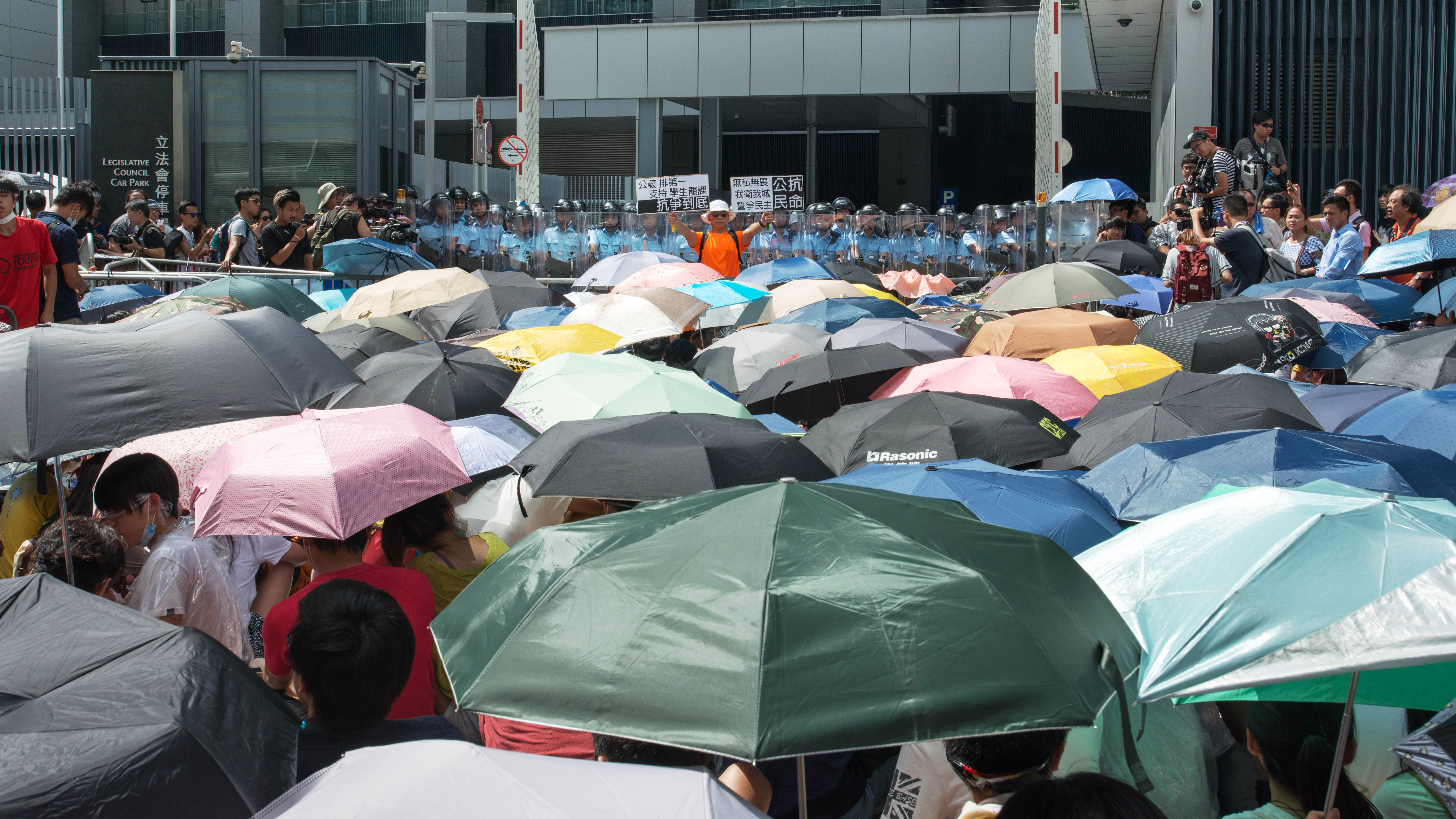 20140927-DSC_3516.jpg 2014.09.27 添美道